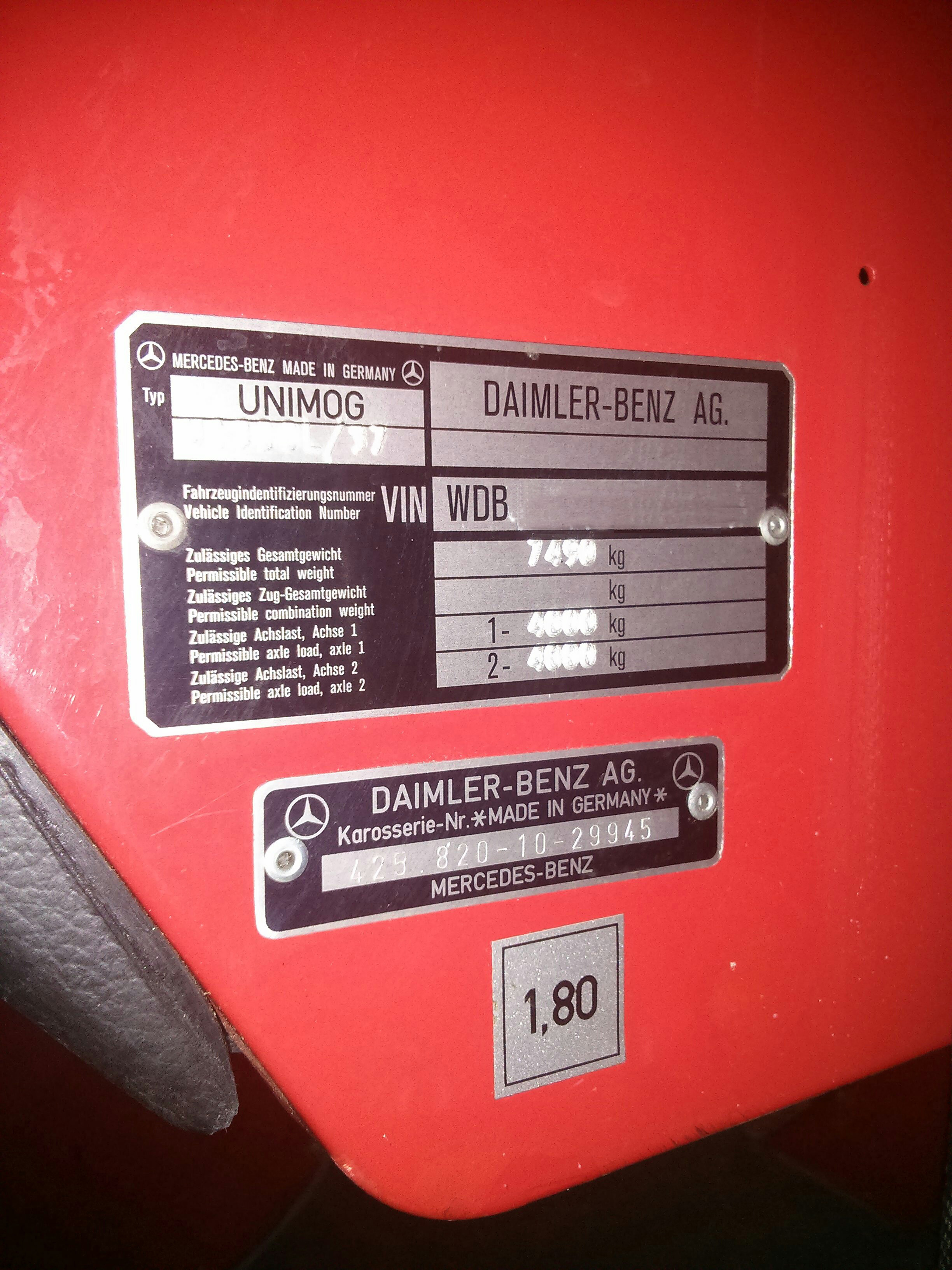 Typenschild Unimog 425.820, hier am Fahrerhaus eines Unimog 435. Seriennummer mit Bildbearbeitungsprogramm unkenntlich gemacht.